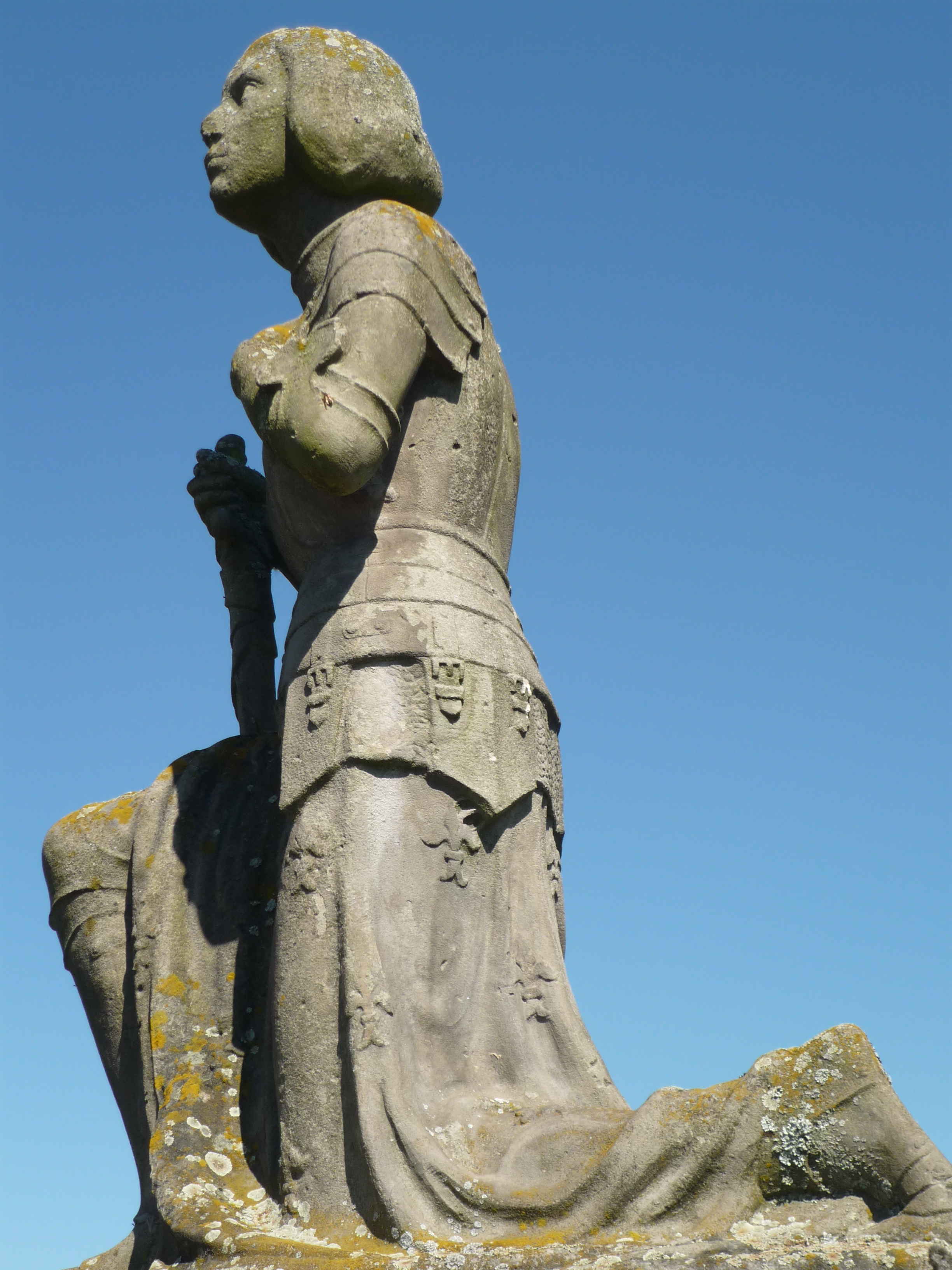 Alfred Marzolff (Français, 1867-1936): Statue de Jeanne d'Arc, 1928, Soufflenheim